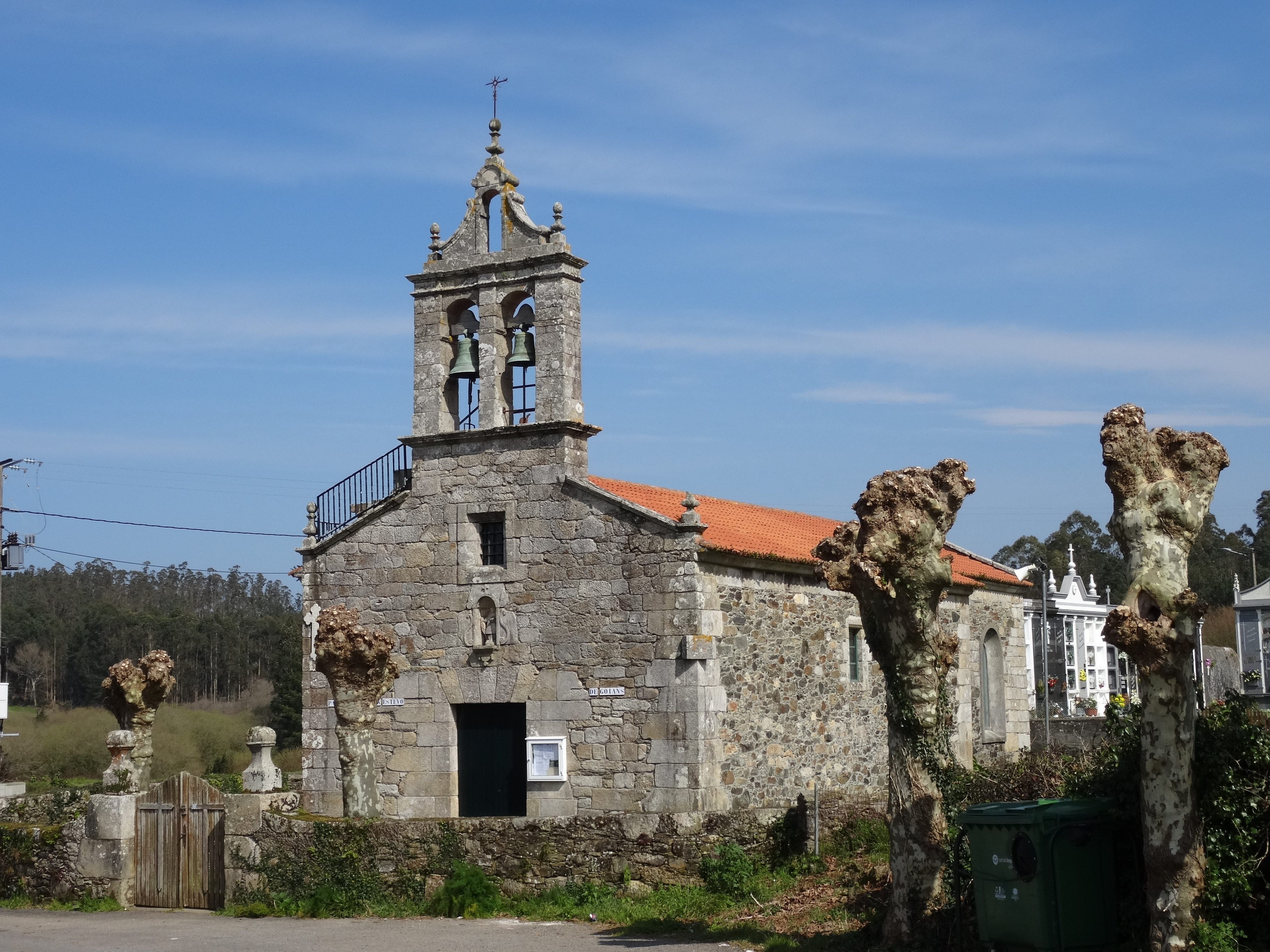 Igrexa de Santo Estevo de Goiáns, Carballo.